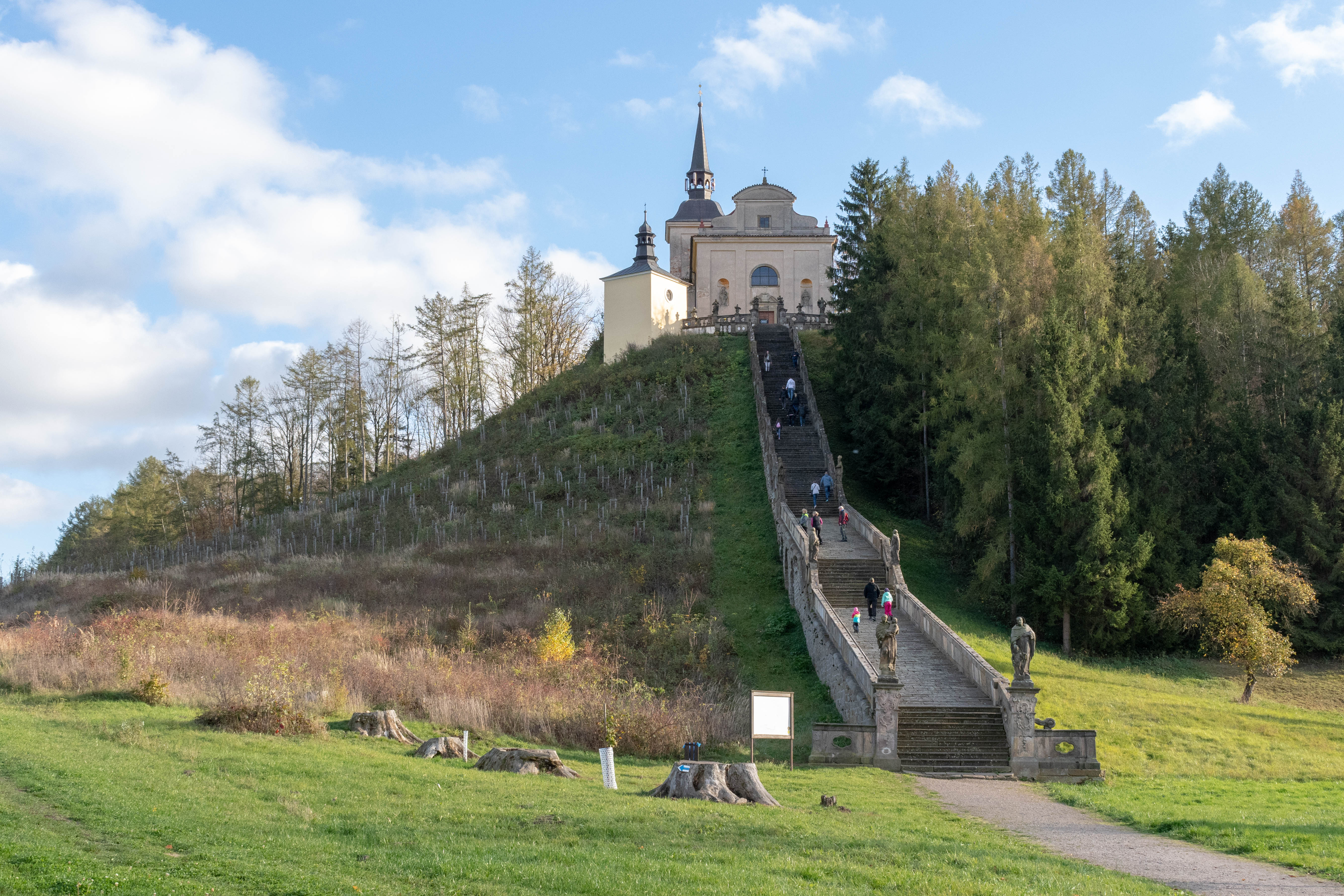 Kostel Panny Marie Bolestné na kopci Homole, obec Malá Lhota